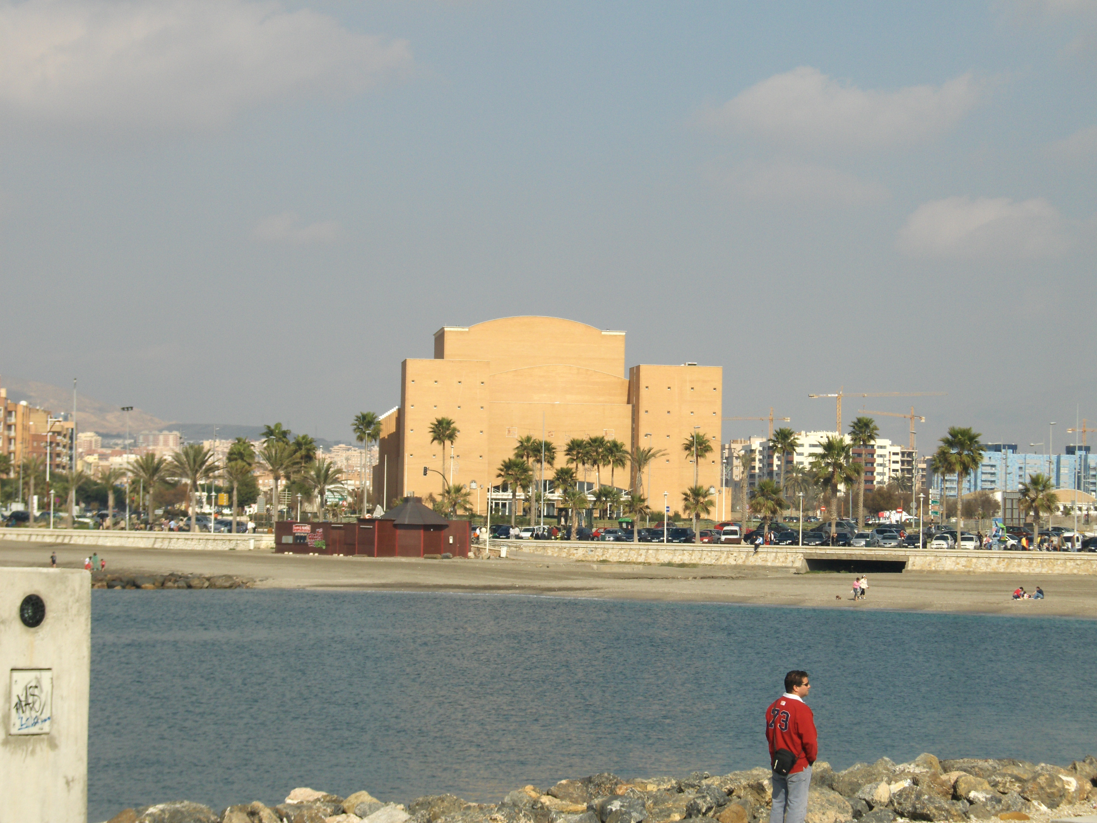 Auditorio Maestro Padilla Almería